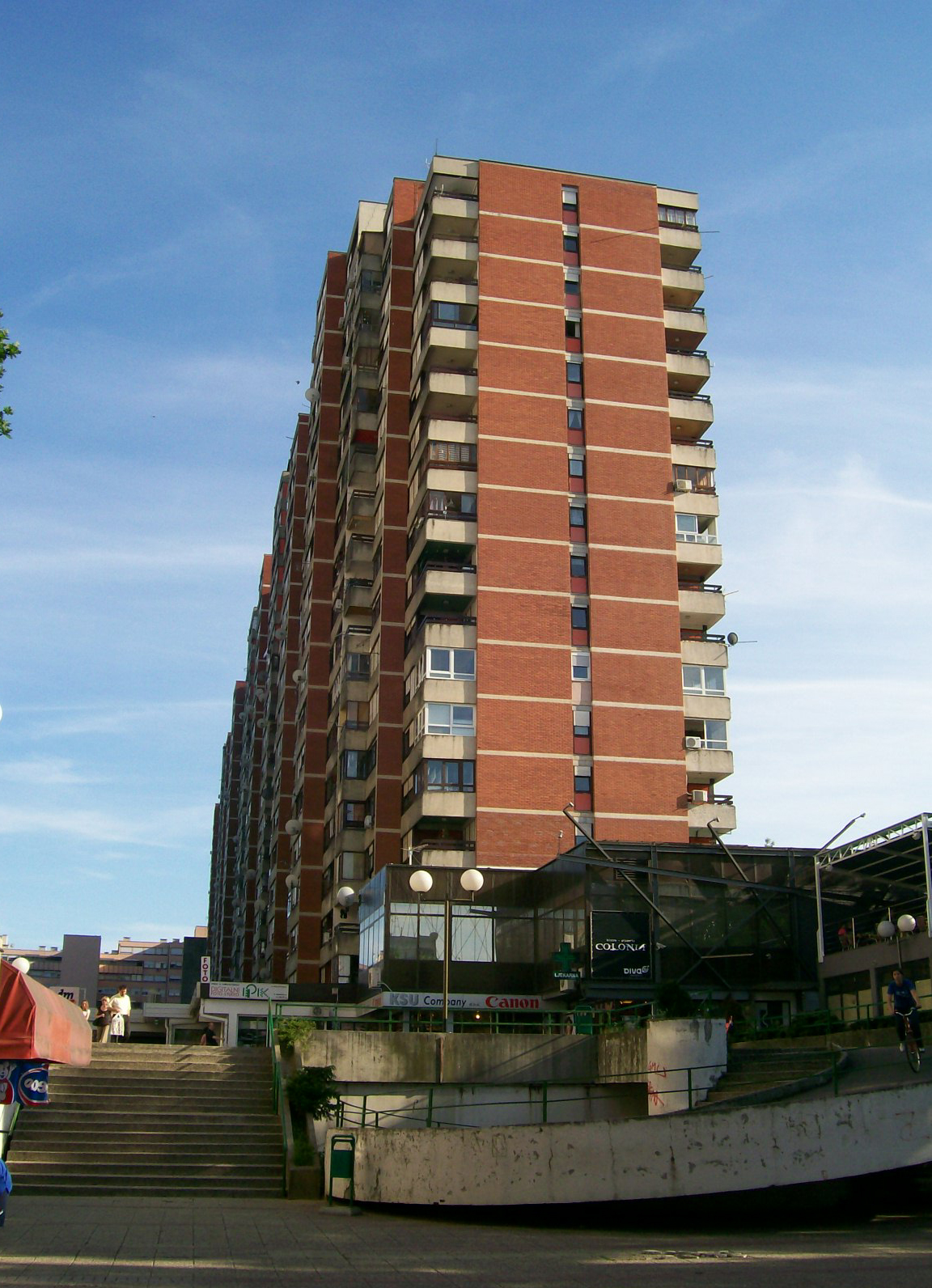 Zgrada Mamutica i plato ispred, Travno, Zagreb.